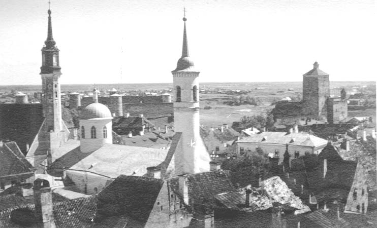 Narva Issandamuutmise katedraal